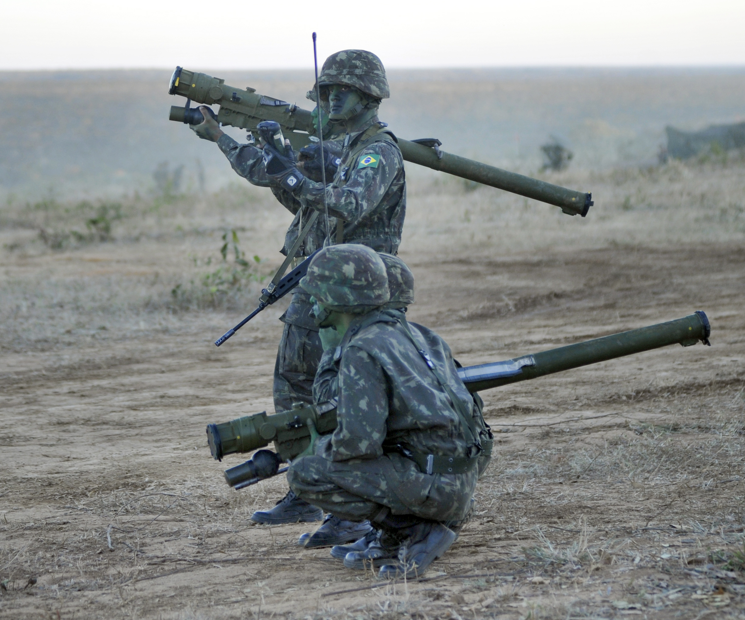 05/08/2015, Formosa - GO Fotos: Gilberto Alves